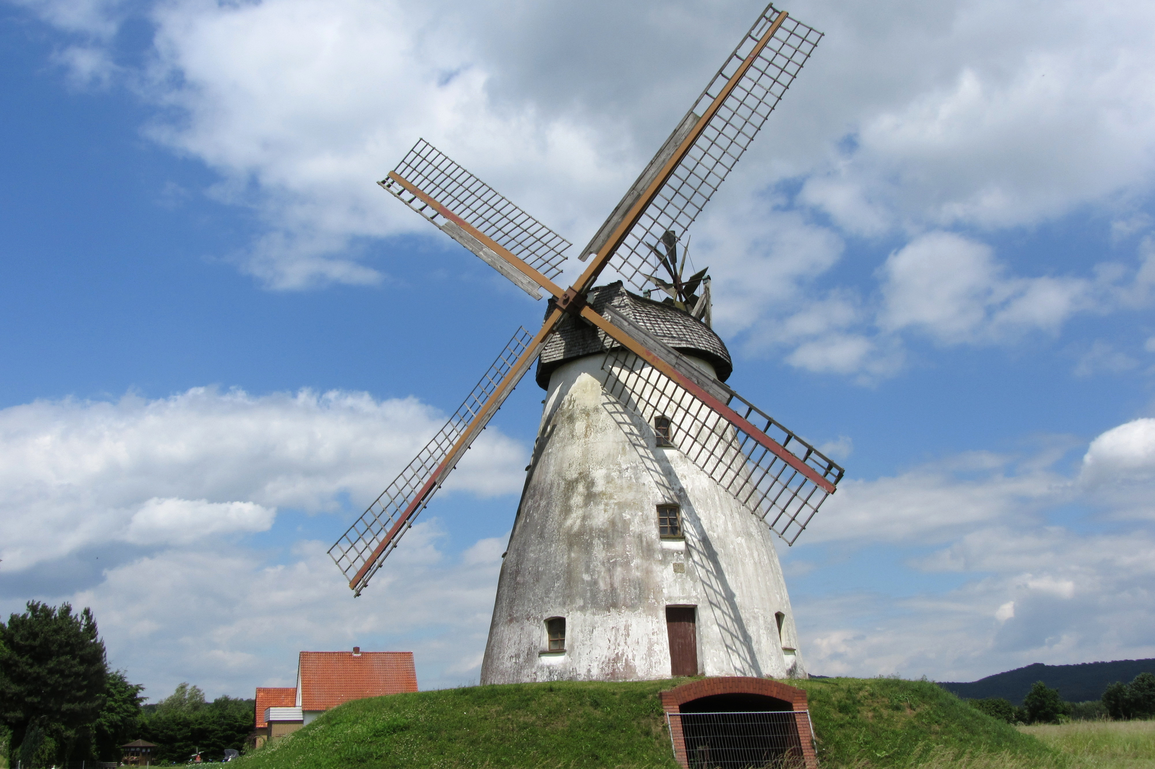 Porta Westfalica-Veltheim. Windmühle.